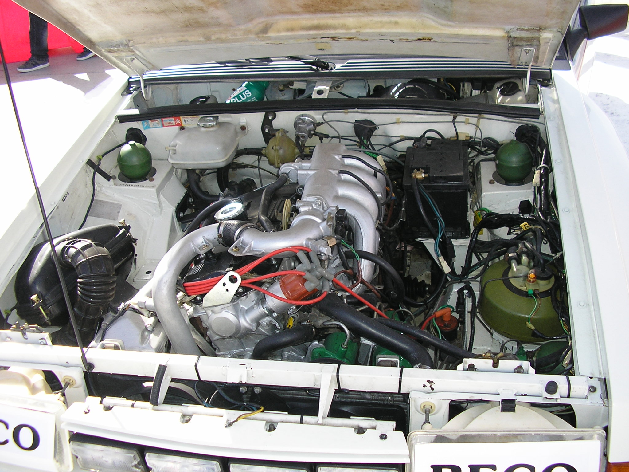 Citroën BX 4TC engine shown in Circuito del Jarama (Madrid). Jornada de puertas abiertas 2006.